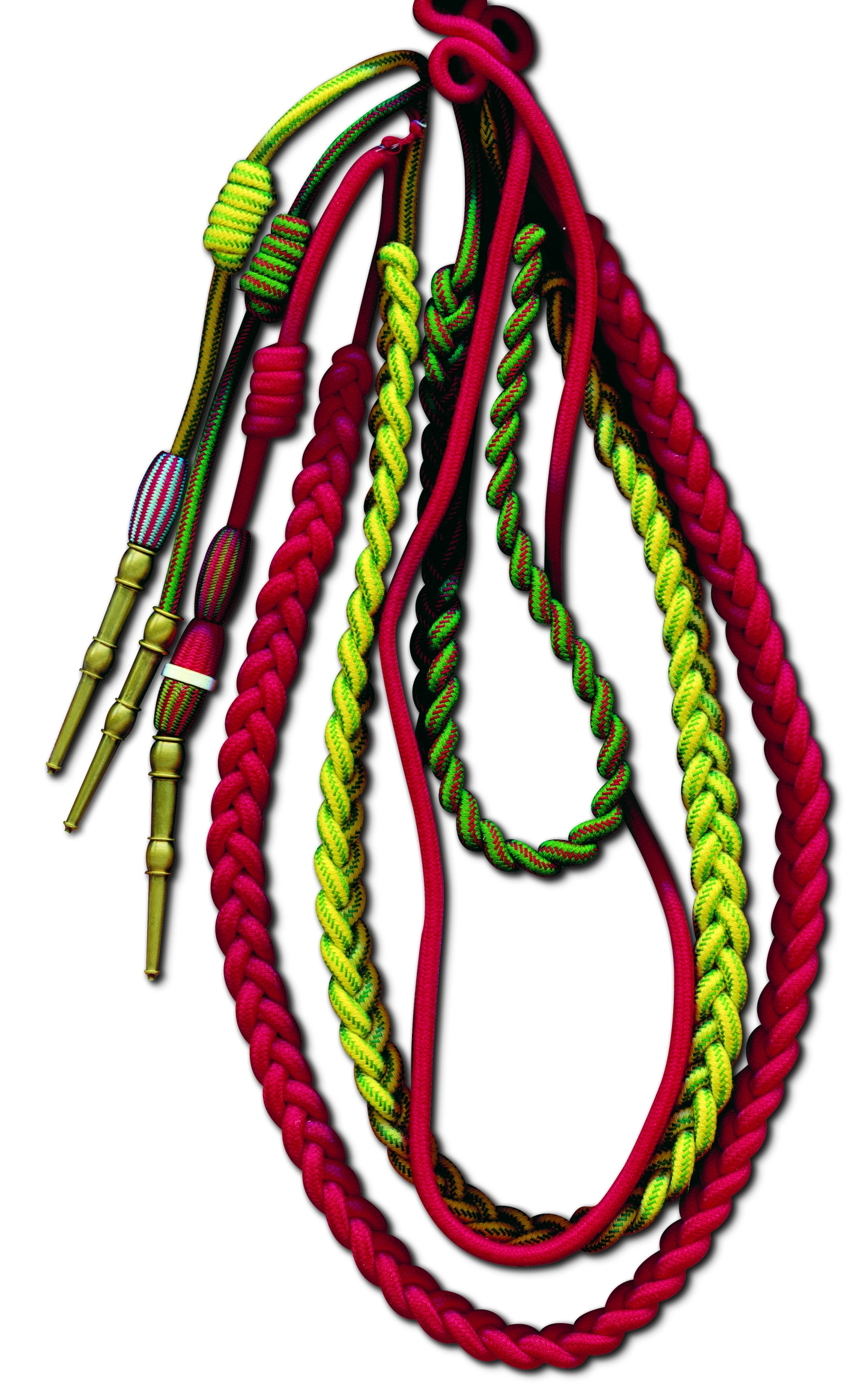 Fourragères du 3e Régiment étranger d'infanterie